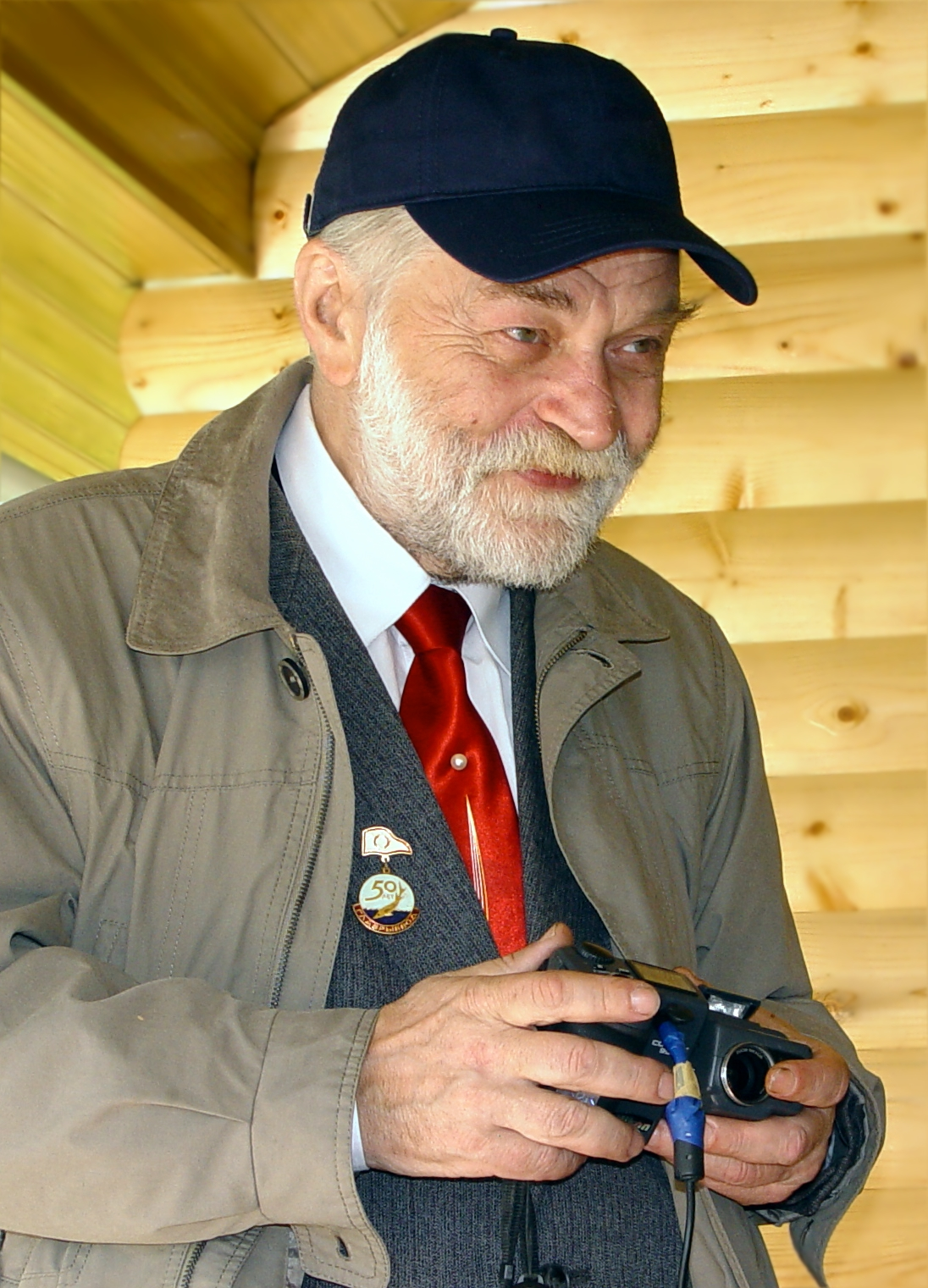 Леонид Александрович Лисовенко. Московская область, 2005 г.